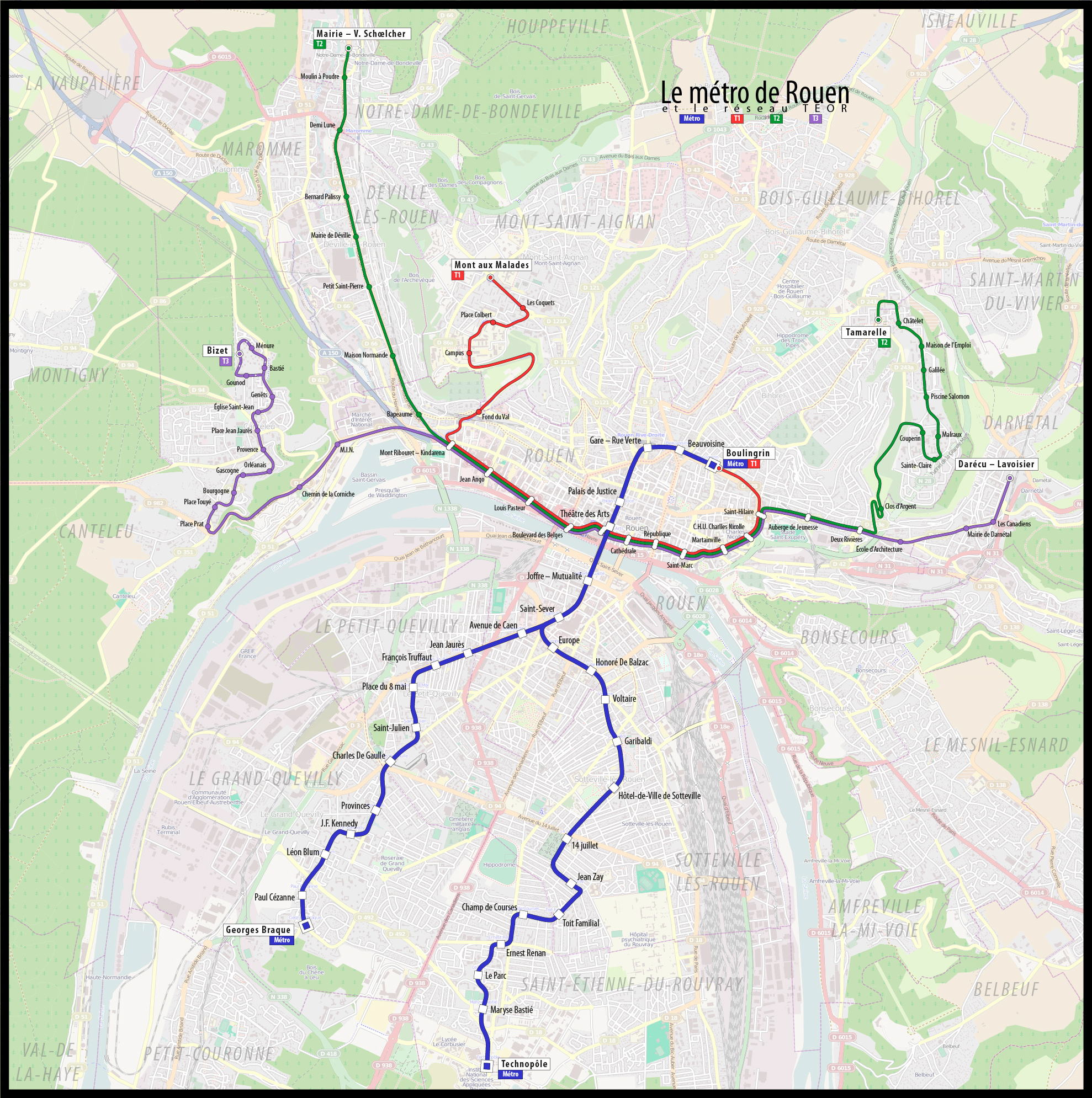 Karta Rouen je podzemne mreže napravio s nevjerojatnom pomoć OpenStreetMaps.